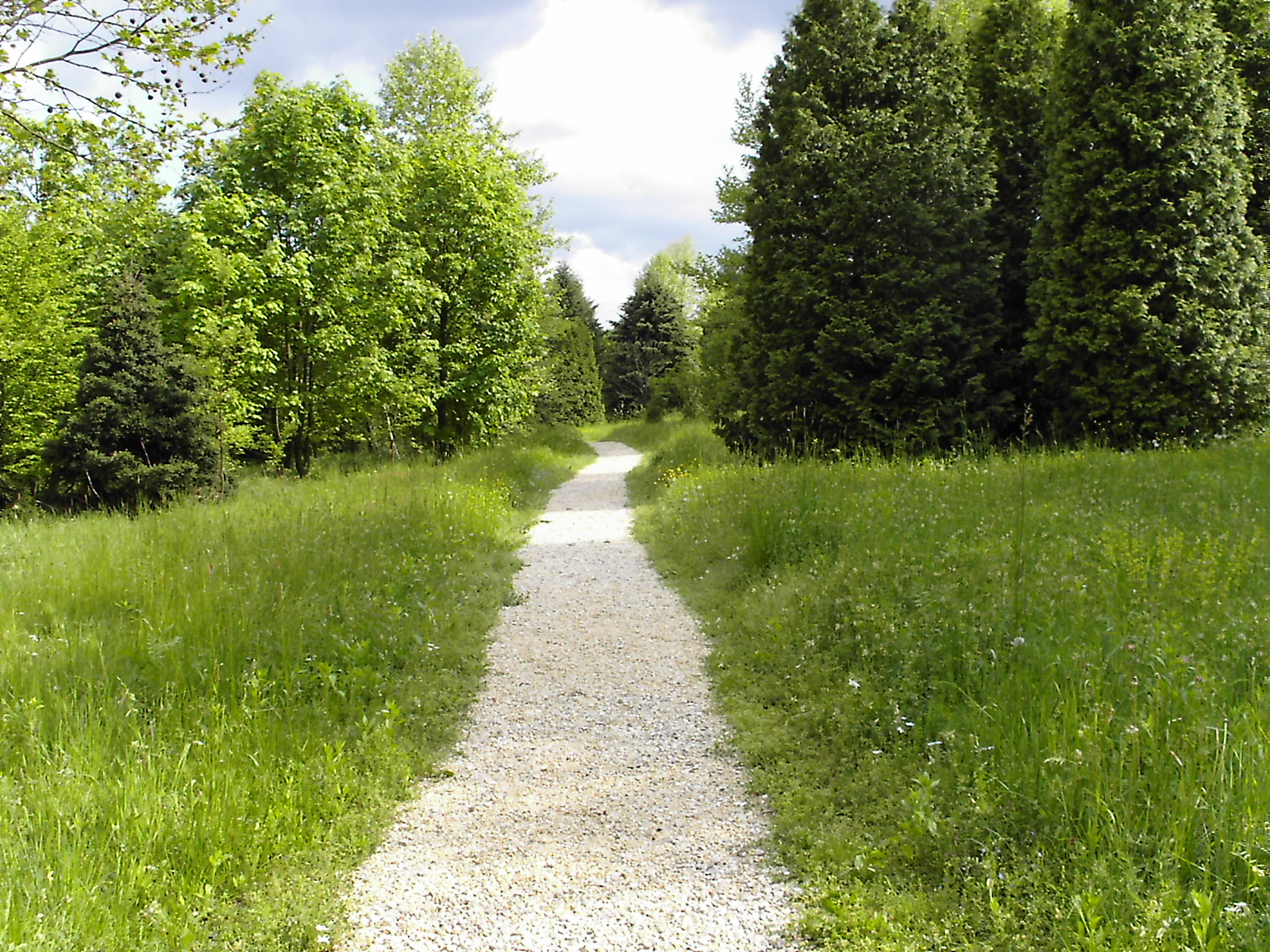 Mezőcsokonya úrtava sétány